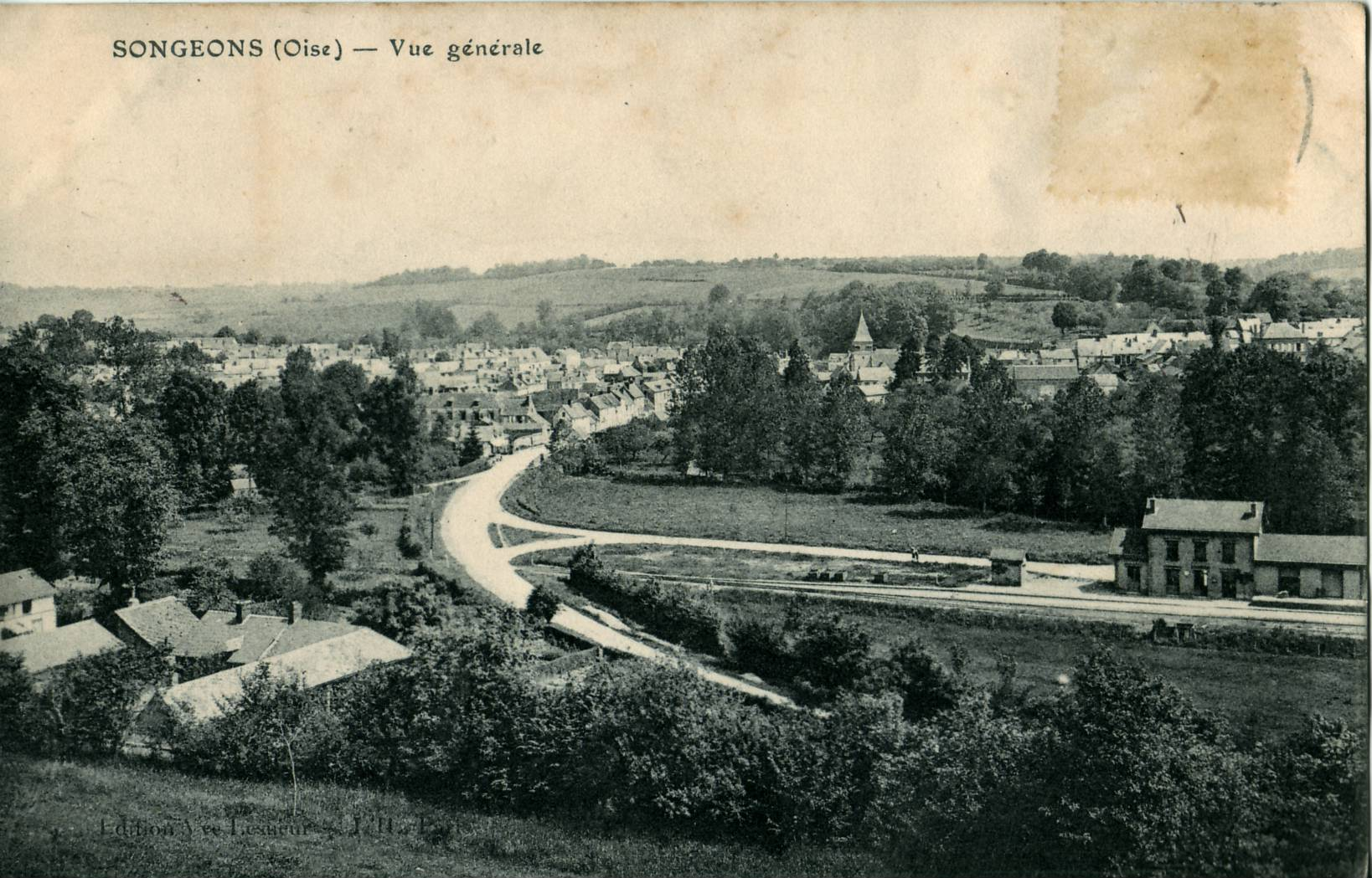 Carte postale ancienne éditée par Lesueur & L'H : SONGEONS - Vue générale. Vue de la Gare de Songeons, sur la ligne de chemin de fer secondaire Milly-sur-Thérain - Formerie